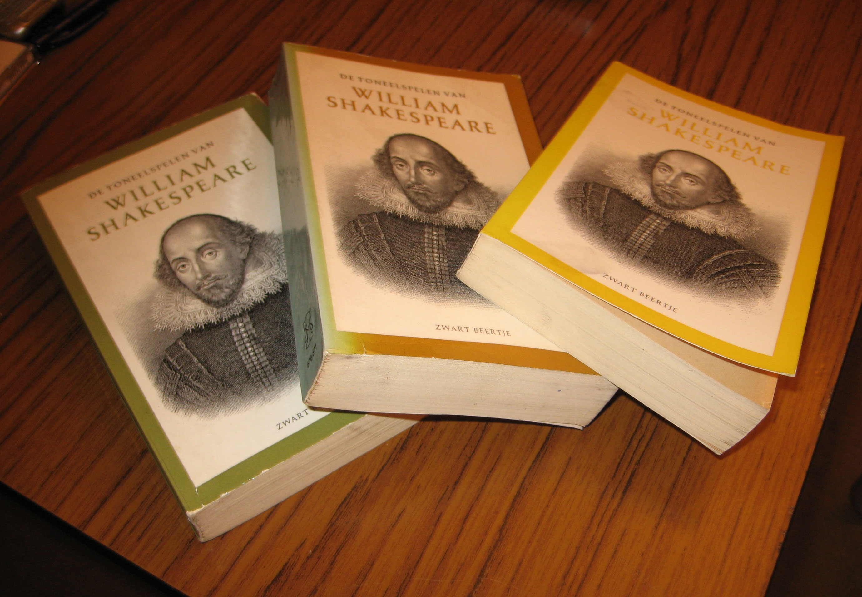 Description